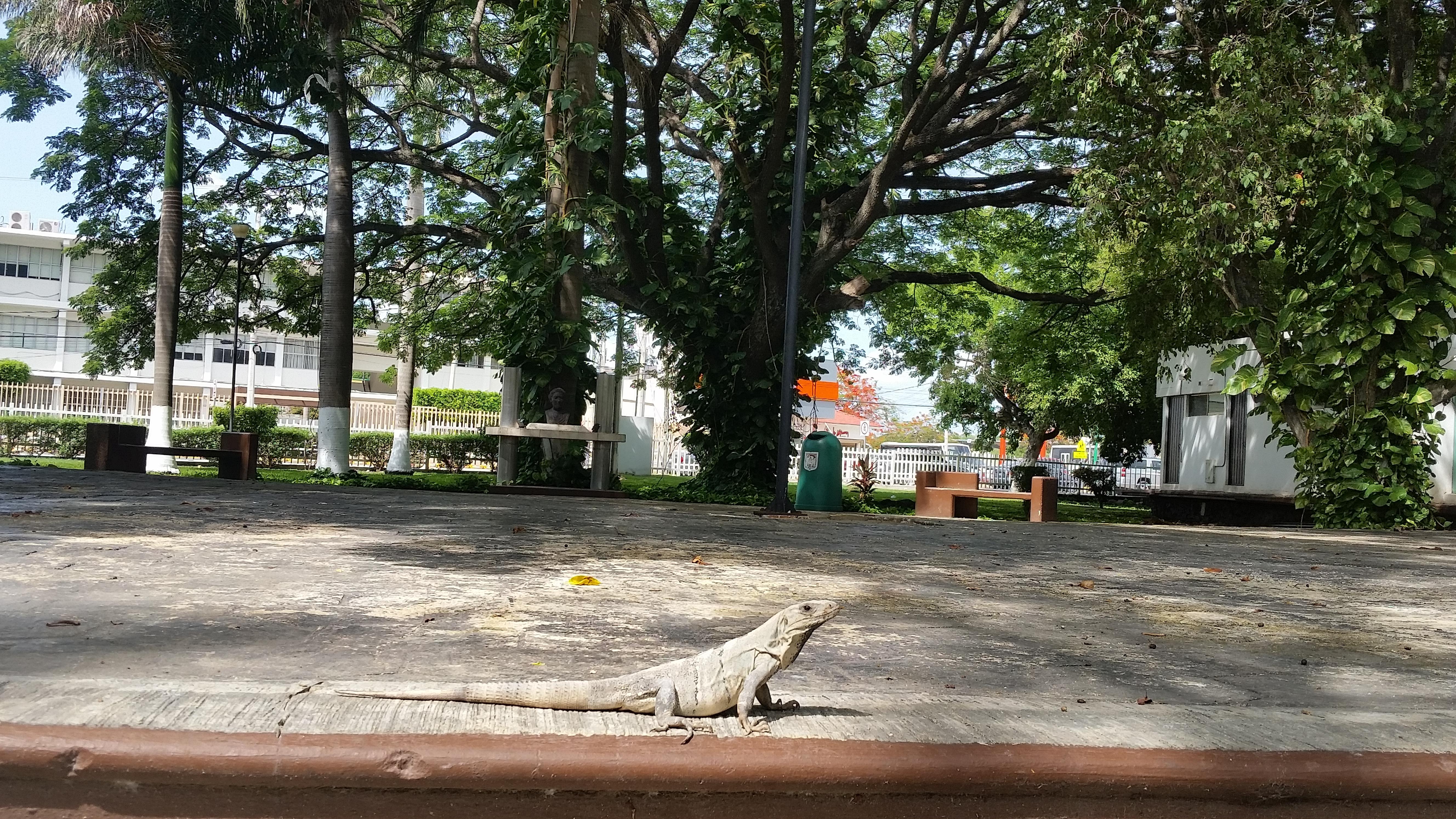 neveria uac